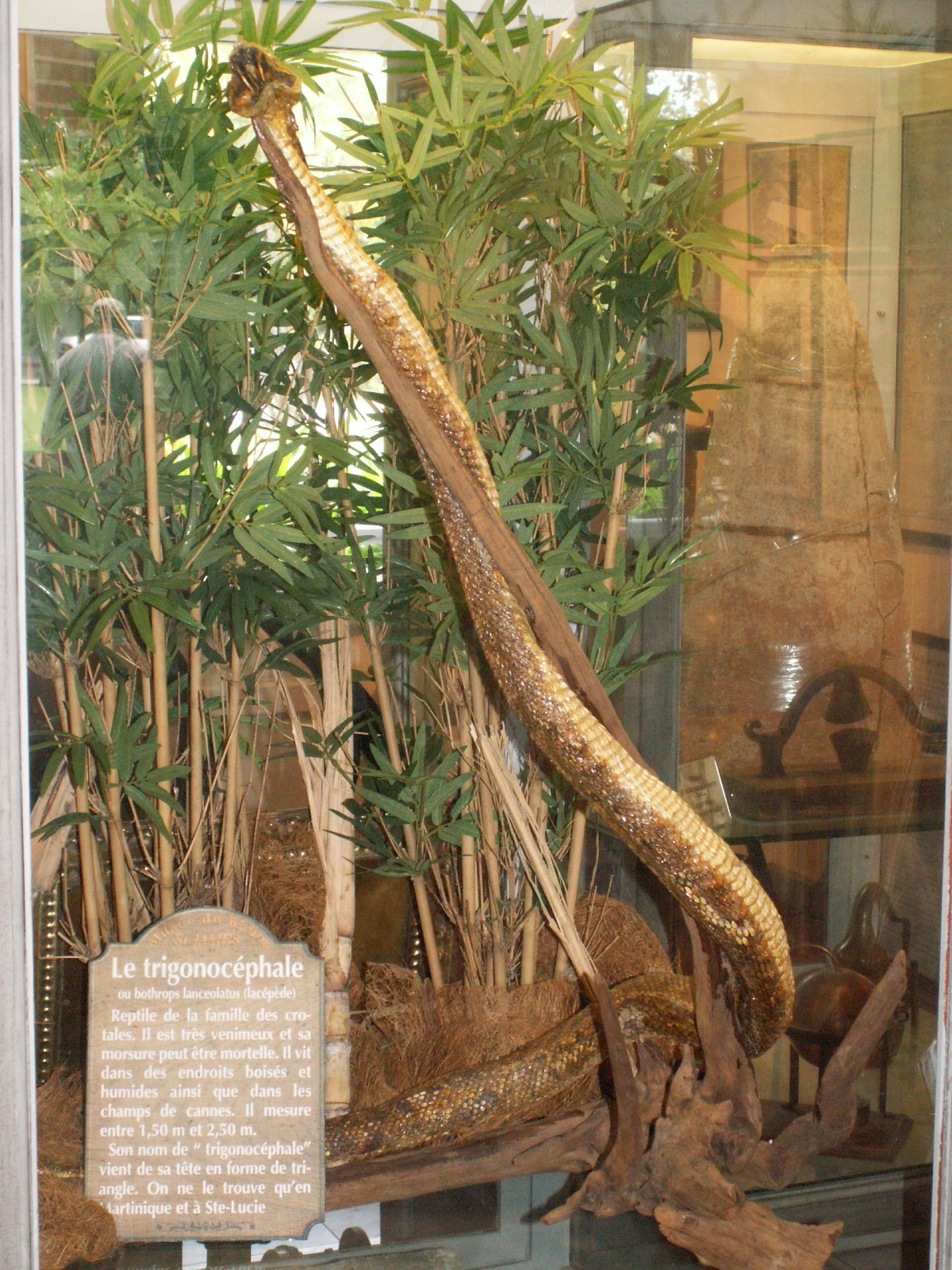 Trigonocephale Martinique 03-07.JPG